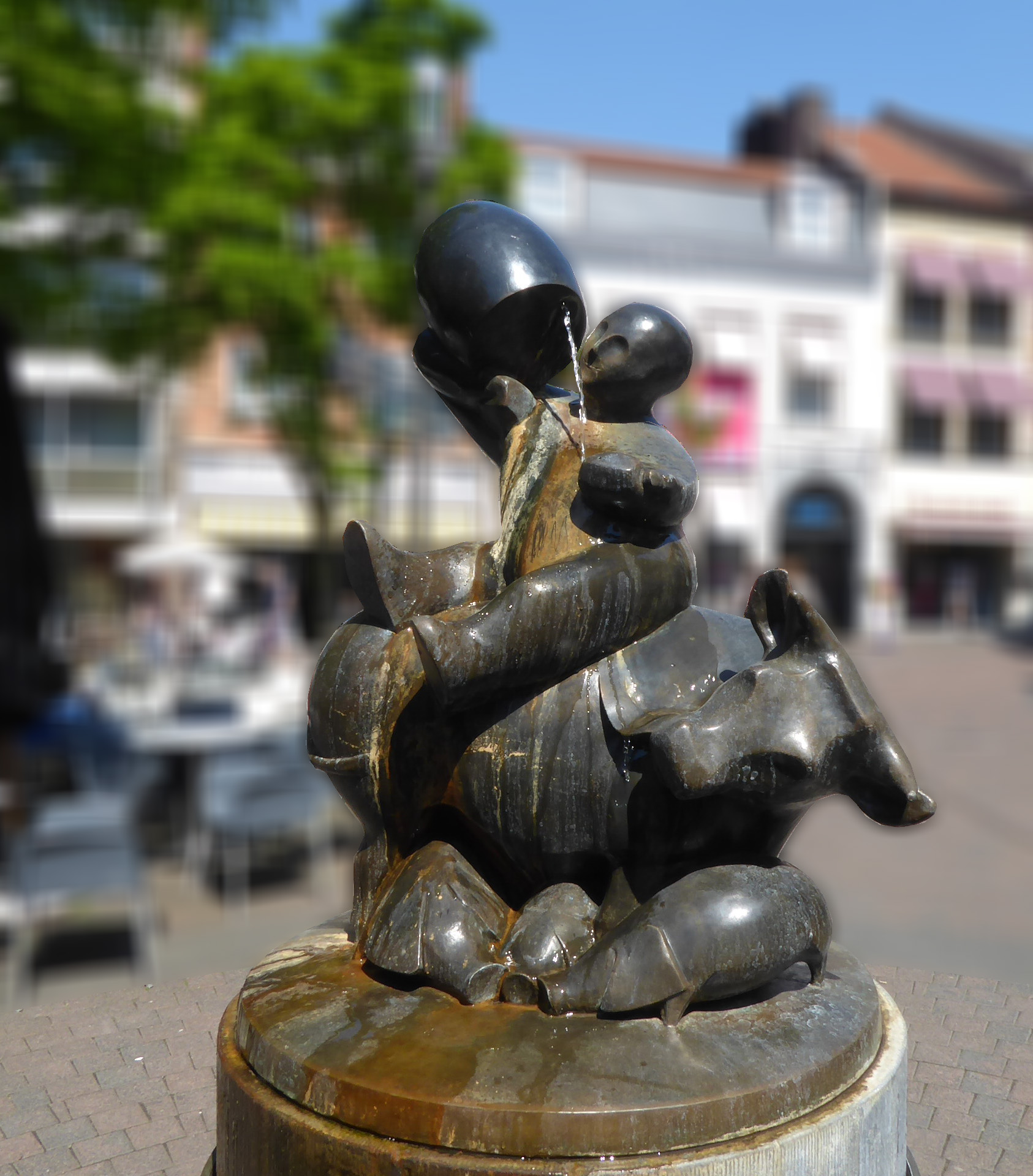 Het Borrelmanneke, standbeeld in Hasselt